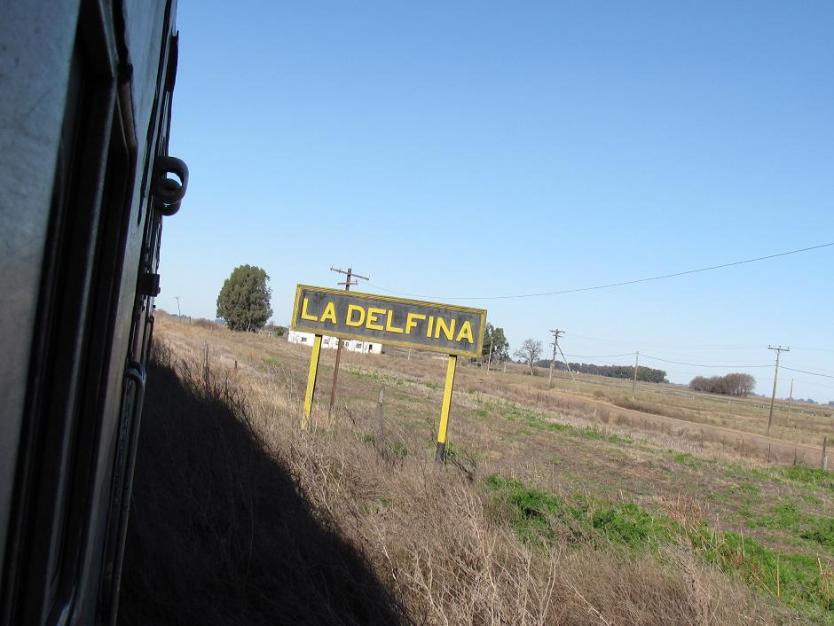 Estación La Delfina, Buenos Aires.